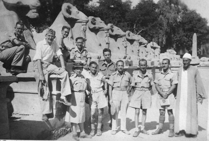 חיילי הבריגה היהודית מישראל בצבא הבריטי, מצטלמים בקרנק לוקסור מצרים